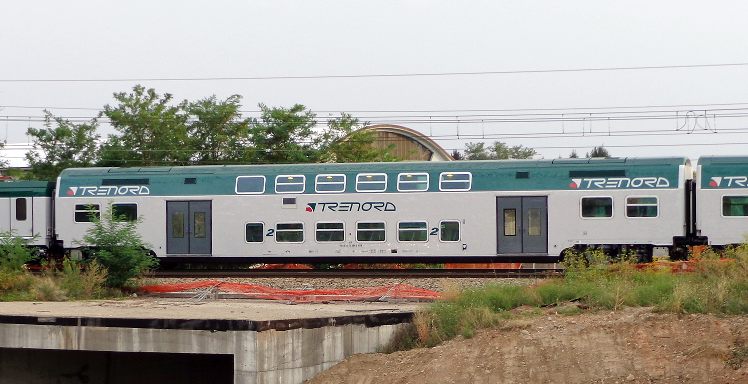 Carrozza ferroviaria tipo Vivalto delle Ferrovie dello Stato in livrea Trenord, in transito presso Busto Arsizio